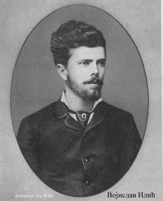 Војислав Илић (1862-1894).